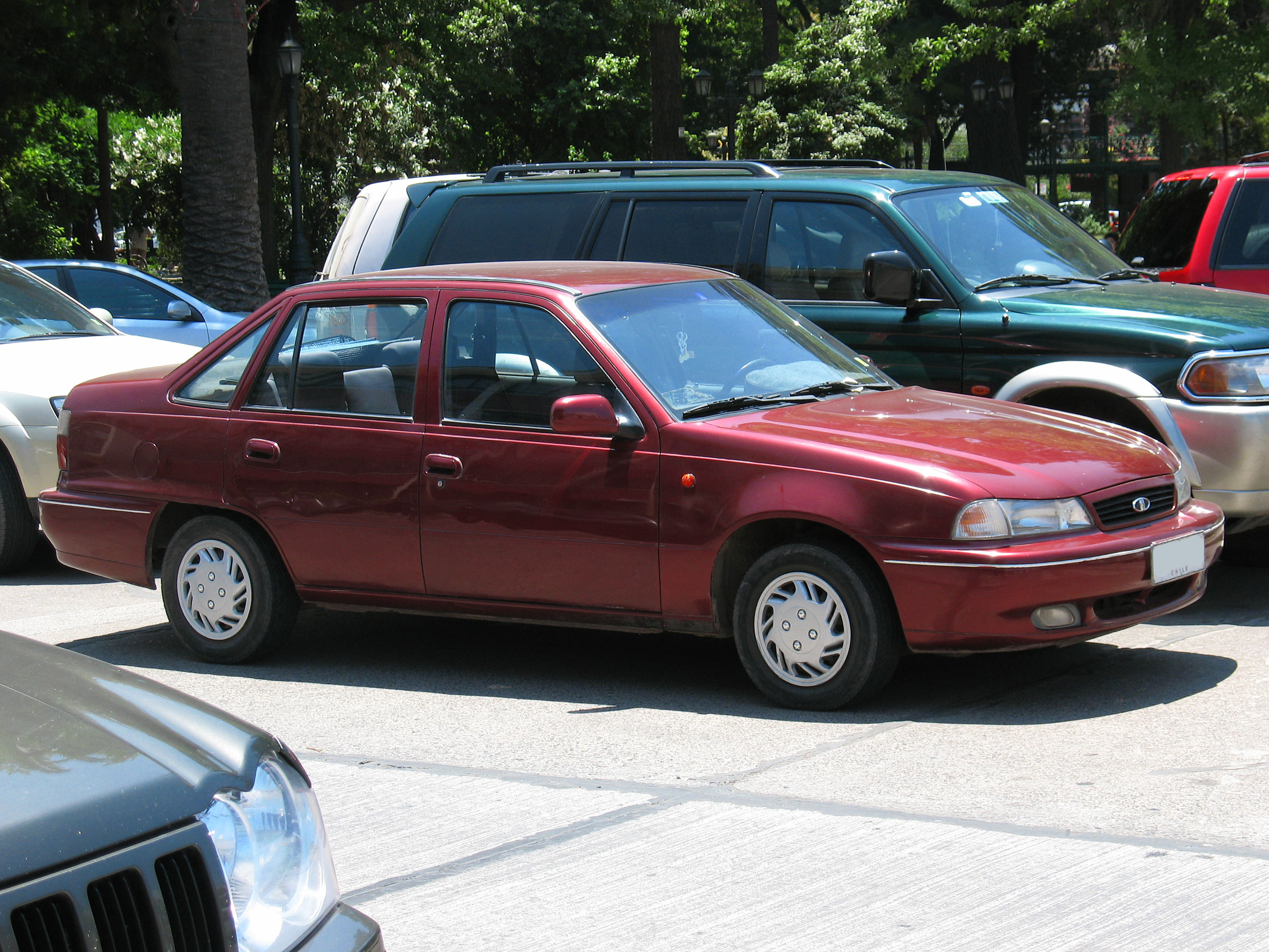 Daewoo Heaven 1.5 GLS 1994